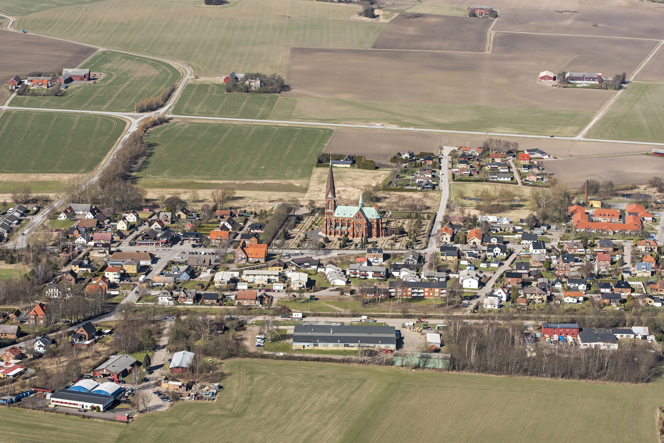 Asmundtorps kyrka, kyrkomiljö. Riksväg 17 passerar norr om kyrkan från vänster till höger i bildens övre halva.